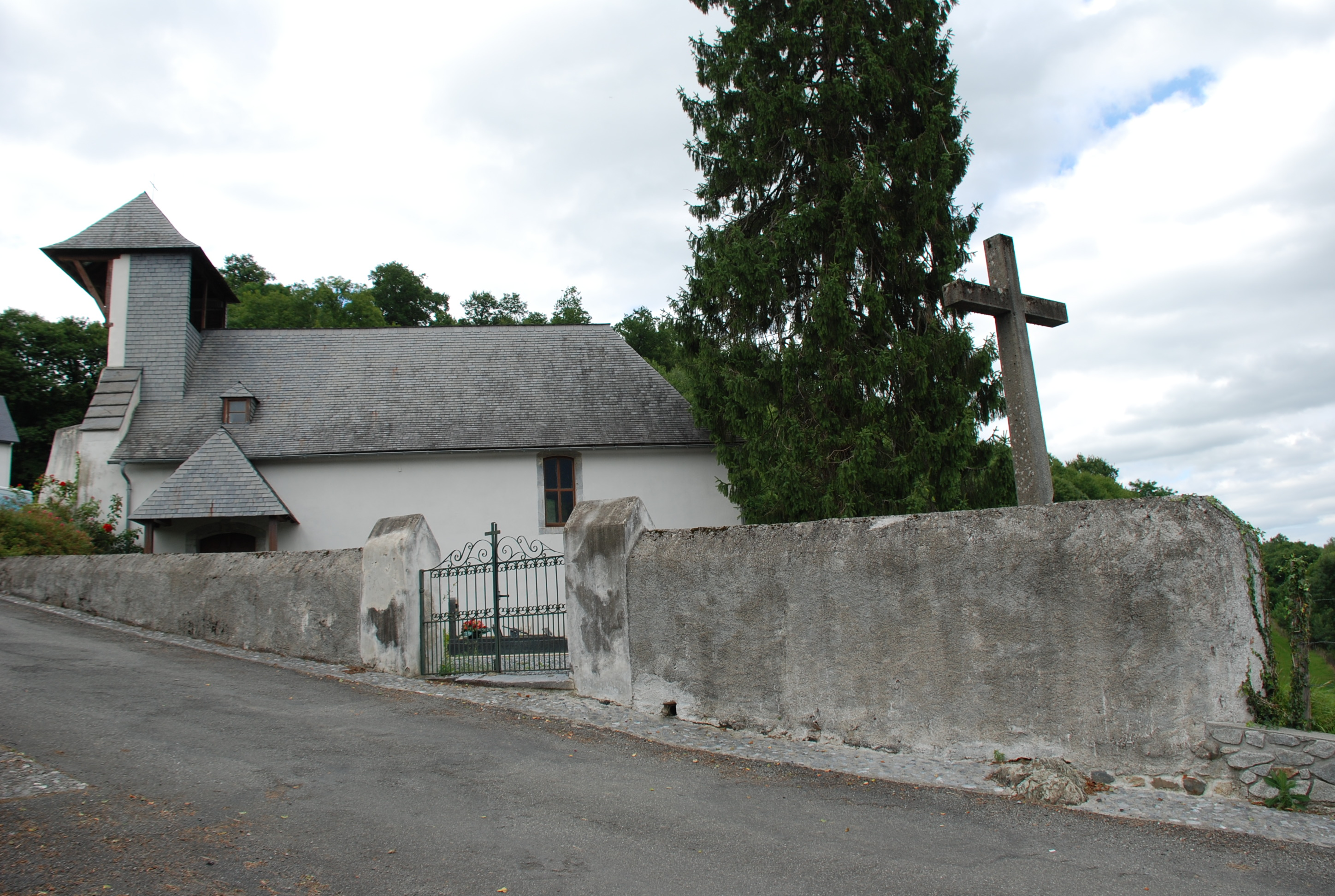 Eglise de Bourréac, Hautes Pyrénées. L'église en bordure du chemin du Courtaou domine le centre du village.